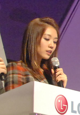 MC: 지석진, 서현진